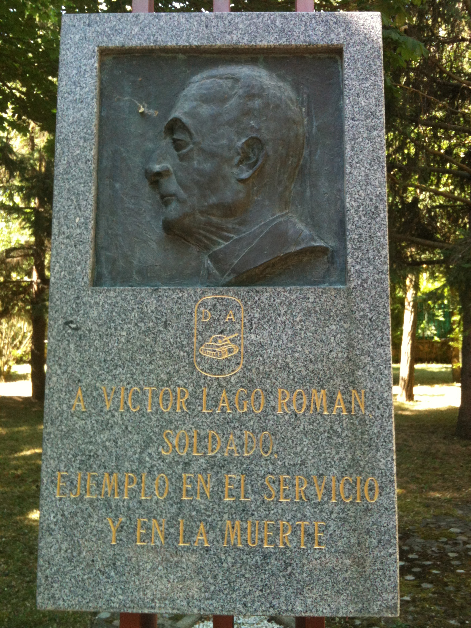 Placa al general Víctor Lago Román. Cuartel de las Fuerzas Pesadas, Burgos, 30 de mayo de 2015.